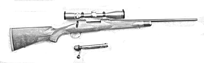 Kimber Rifle in .270, schwarz/weiß (black/white)